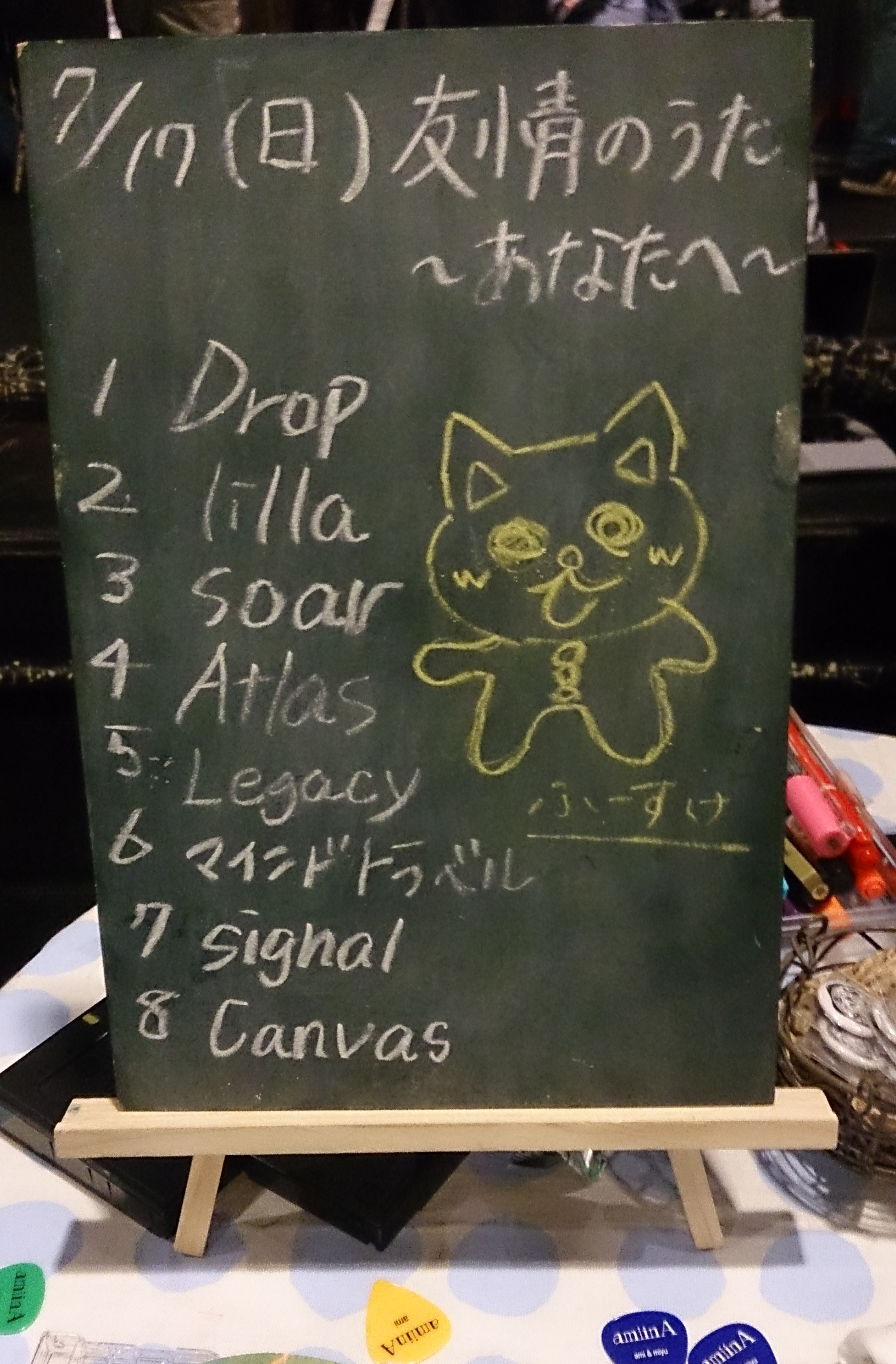 amiinAセトリボード(20160717(1))